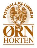 Dette er logoen til FK Ørn-Horten